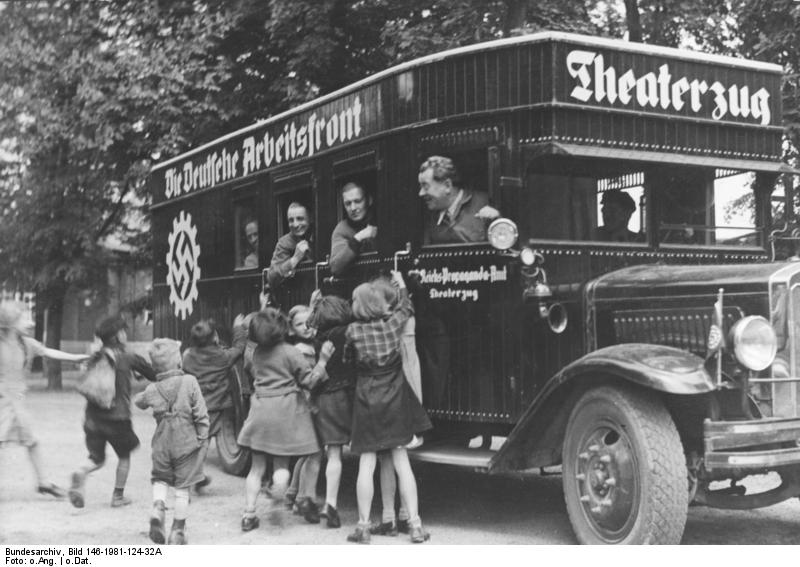 Mit dem Theaterzug der DAF unterwegs. Die erste Begrüssung durch die Jugend des Ortes nach der Ankunft.